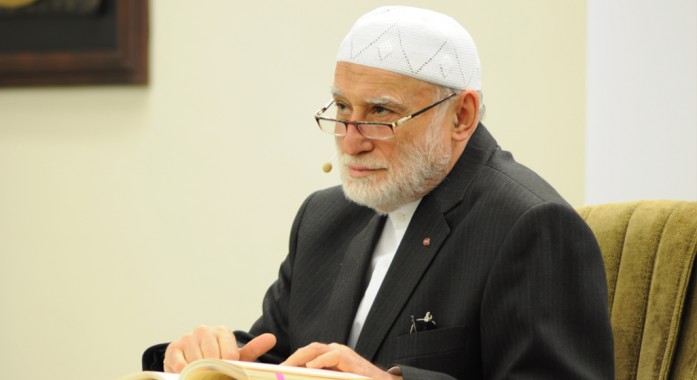 Hocaefendi bir sohbet esnasında konuşurken.